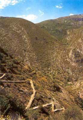 Barranco del Infierno (escalones moriscos) Alicante (Comunidad Valenciana) España. Vall de Laguar. (provincia de Alicante. Barrranco del Infierno (escalones moriscos).